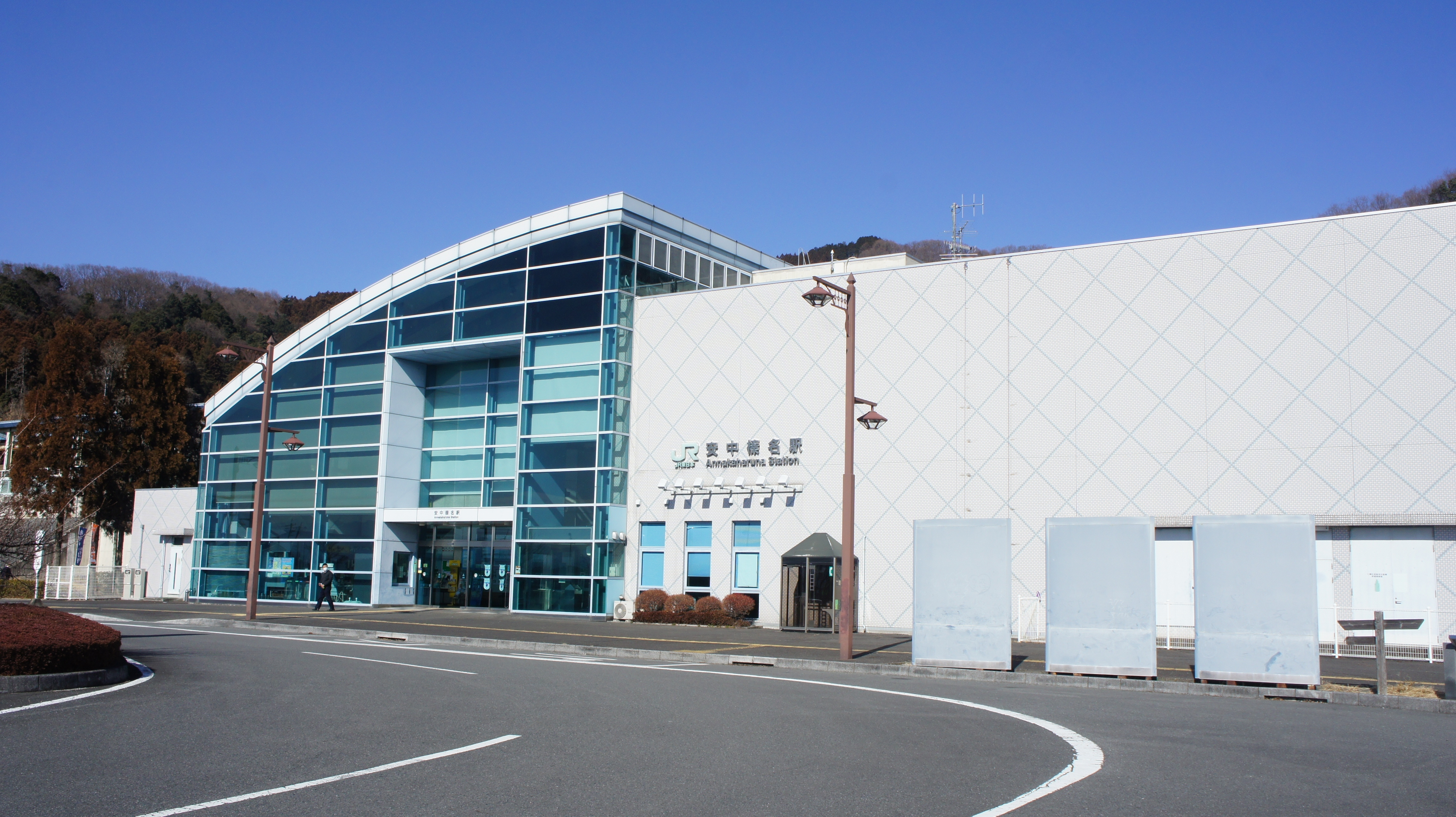 安中榛名駅の駅舎